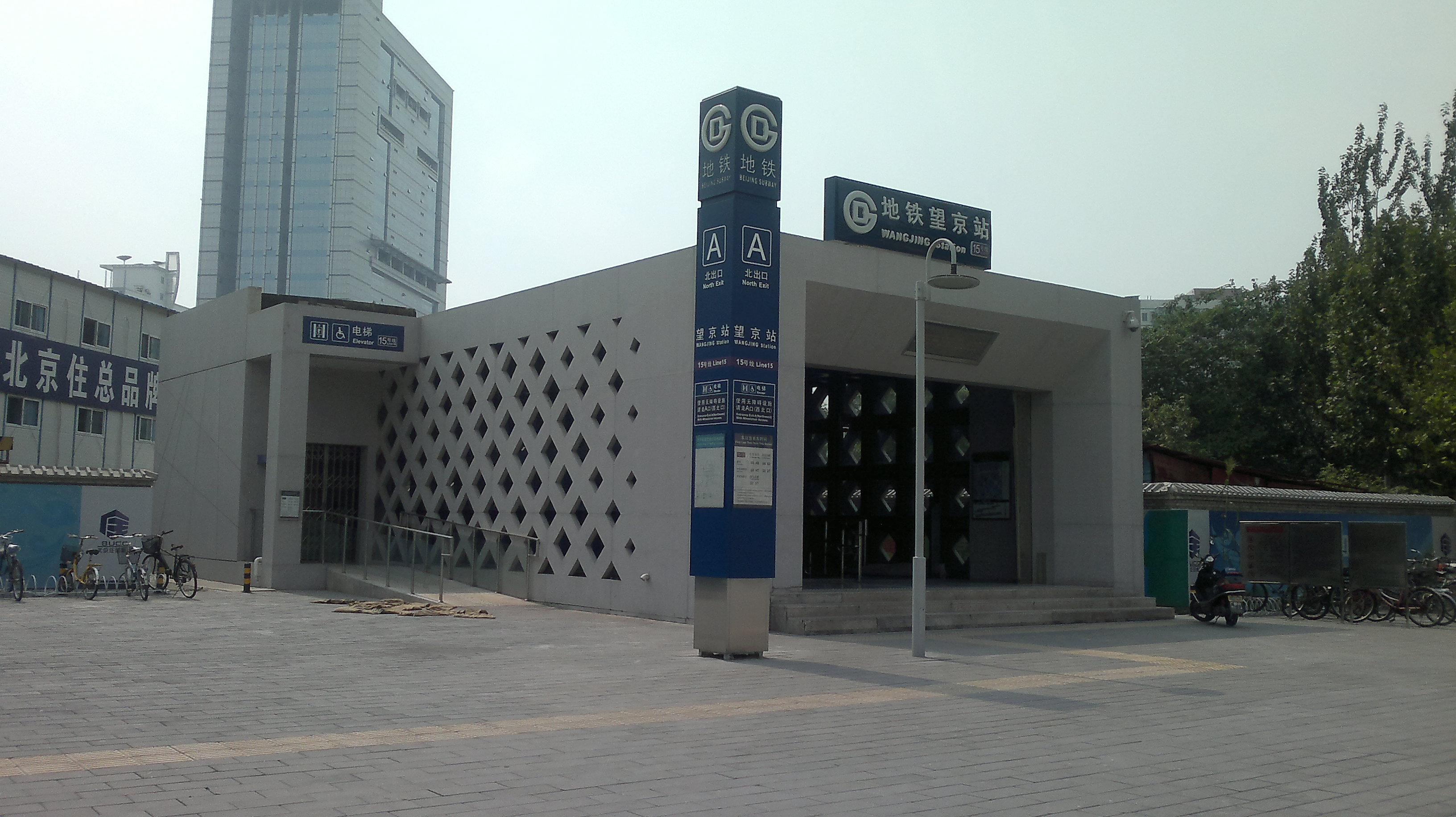 北京地鐵十五號綫望京站